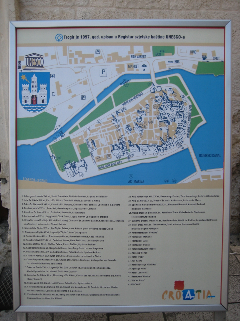 Plan grada Trogira, Croatia